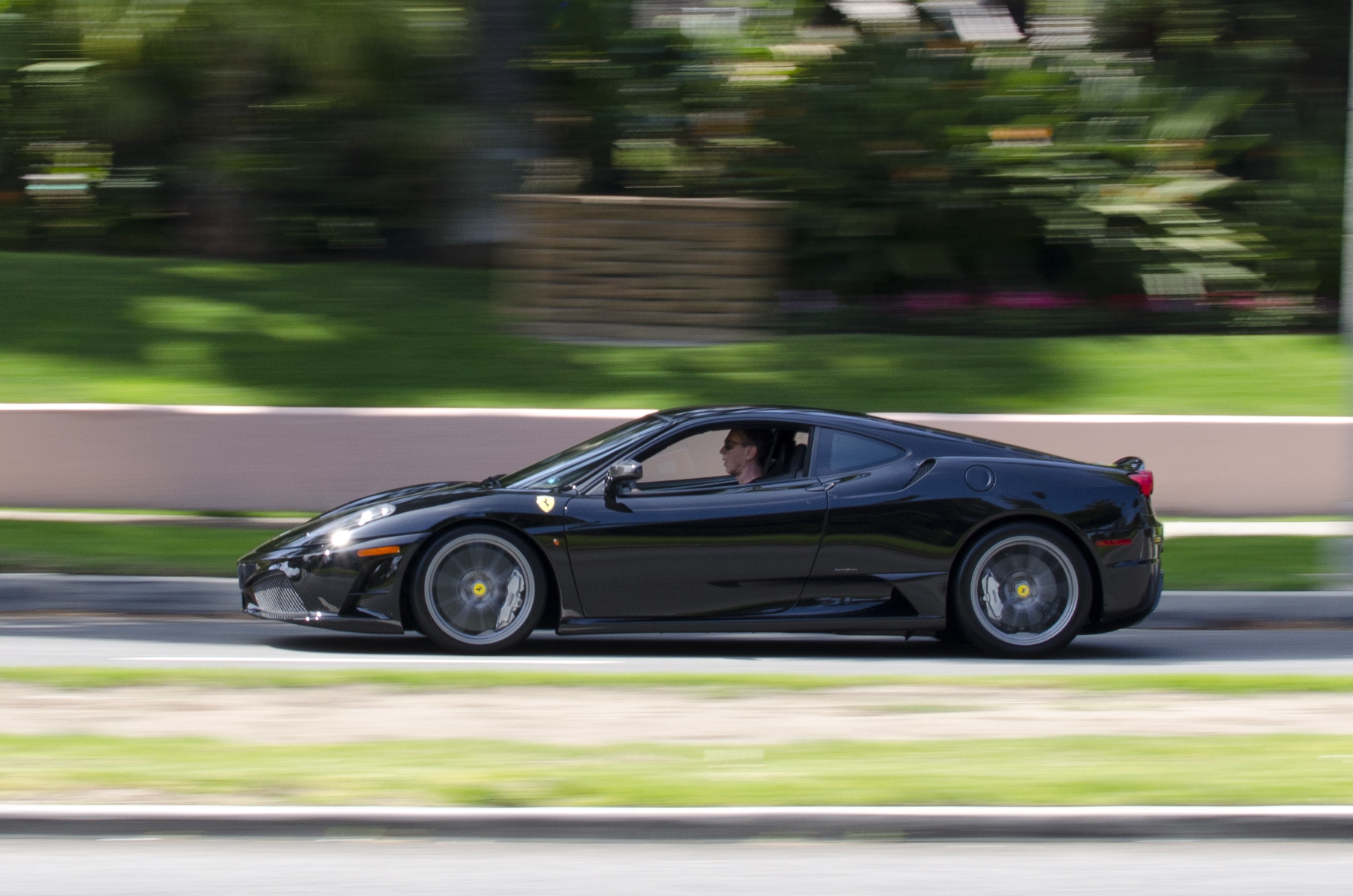 Una Ferrari F430 Scuderia nera lucida